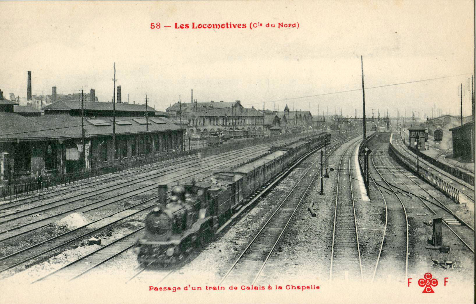 Carte postale ancienne éditée par FF CCCC, série Les locomotives (Cie du Nord), n°58 : Passage d'un train de Calais à La Chapelle